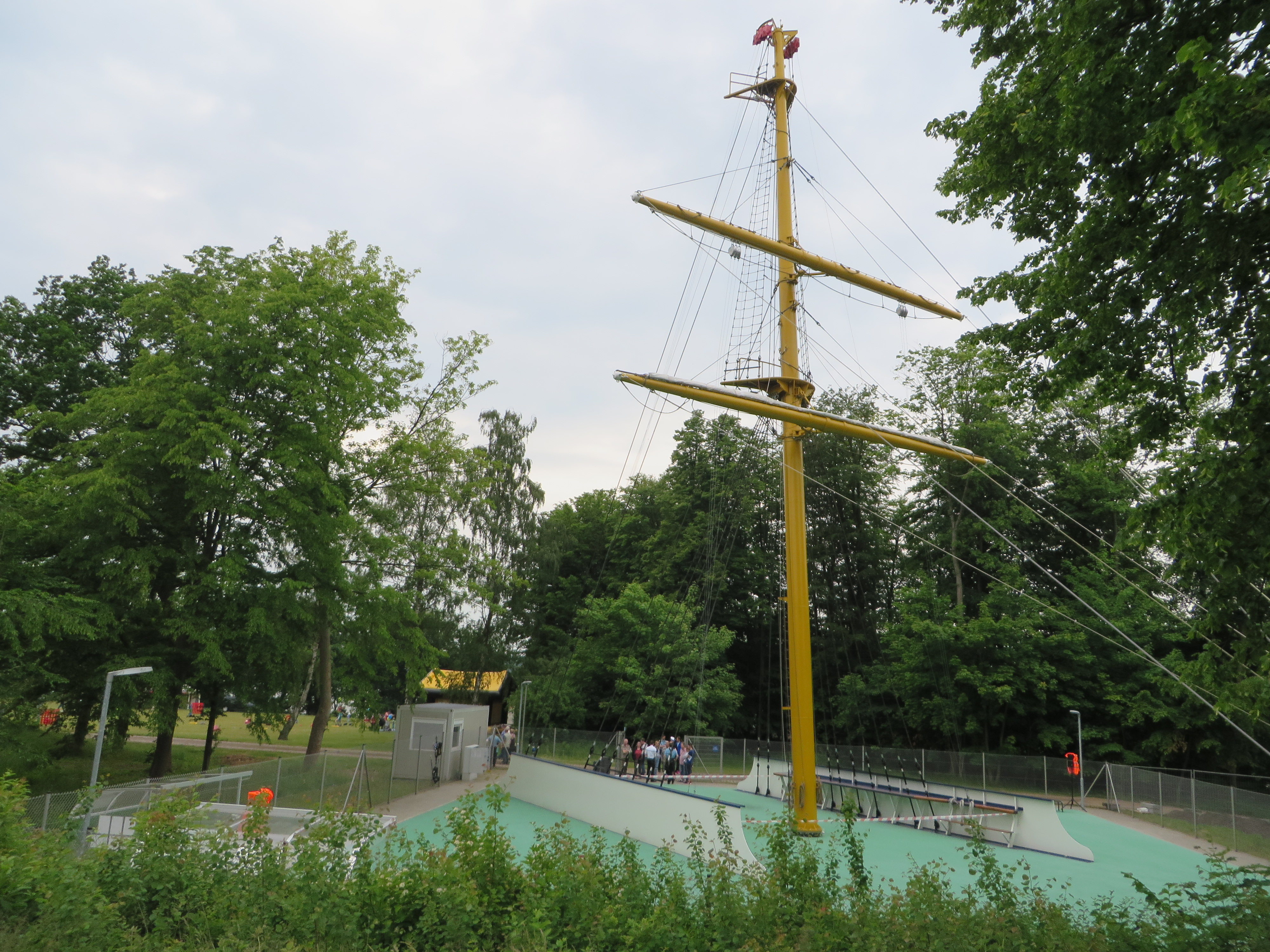 Gorch-Fock-Übungsmast (Flensburg-Mürwik 2015), Bild 03